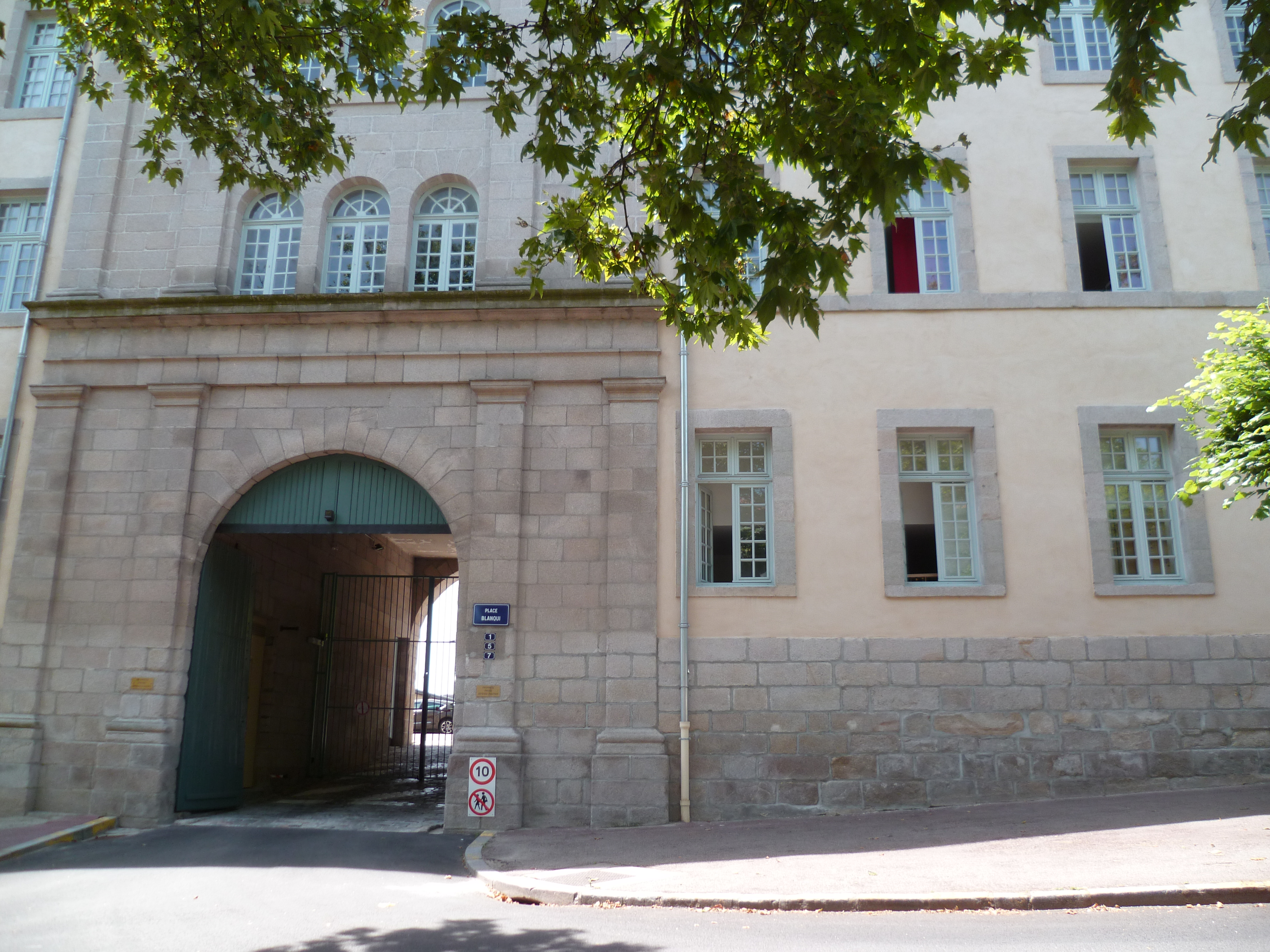 ancienne cité administrative blanqui